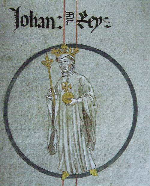 Rotlle genealògic del Monestir de Poblet